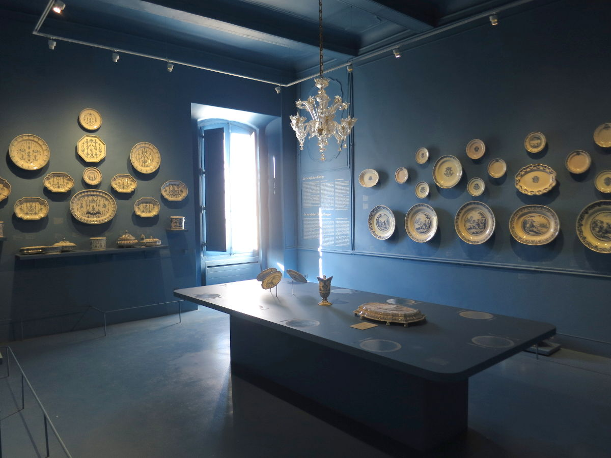 Intérieur de l'une des salles du musée de la faïence de Moustiers-Sainte-Marie